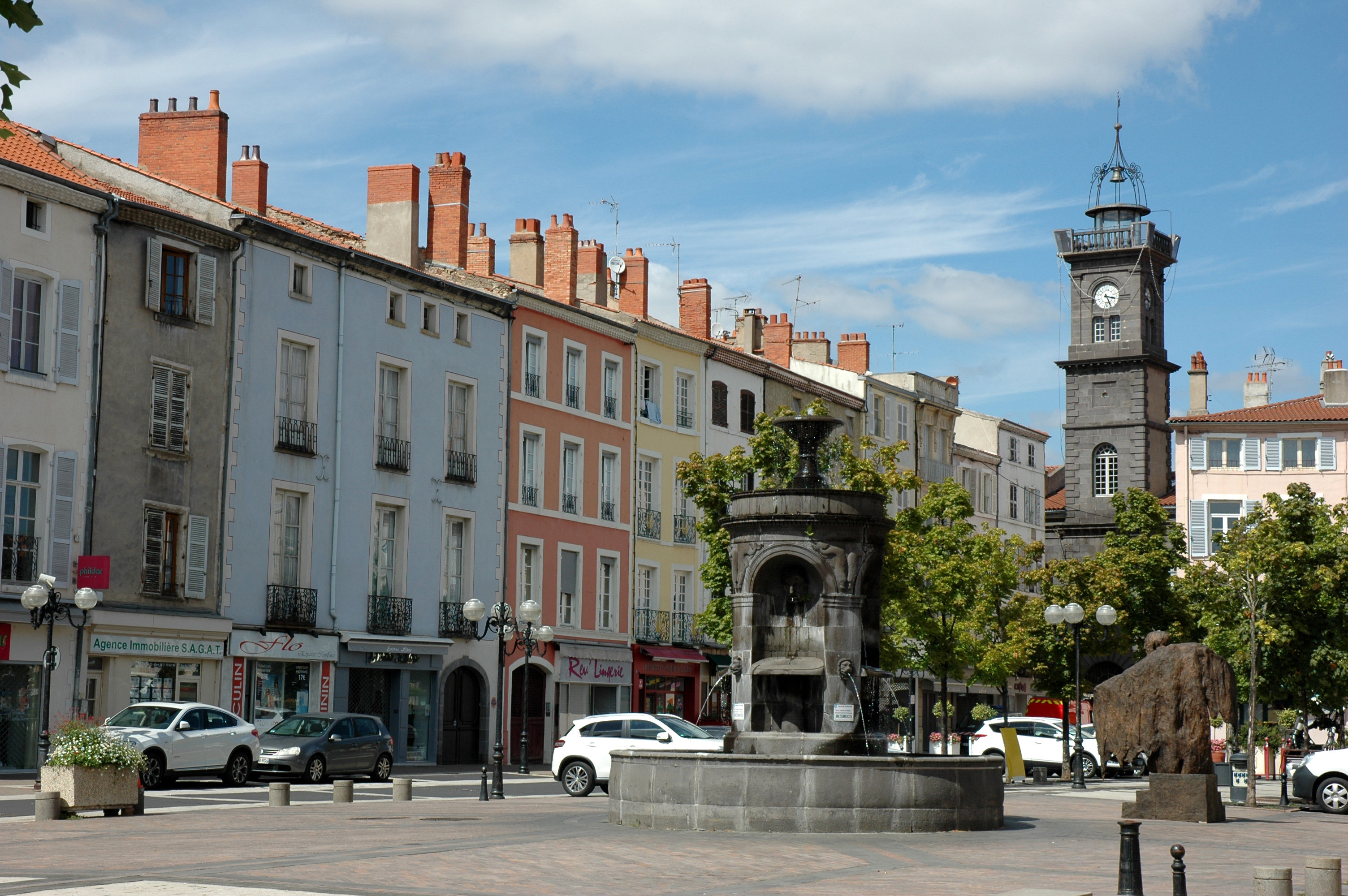 Tour de l'Horloge (Issoire)